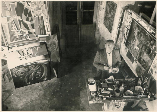 Franz Schömbs im Atelier in der Sternwarte in Mannheim